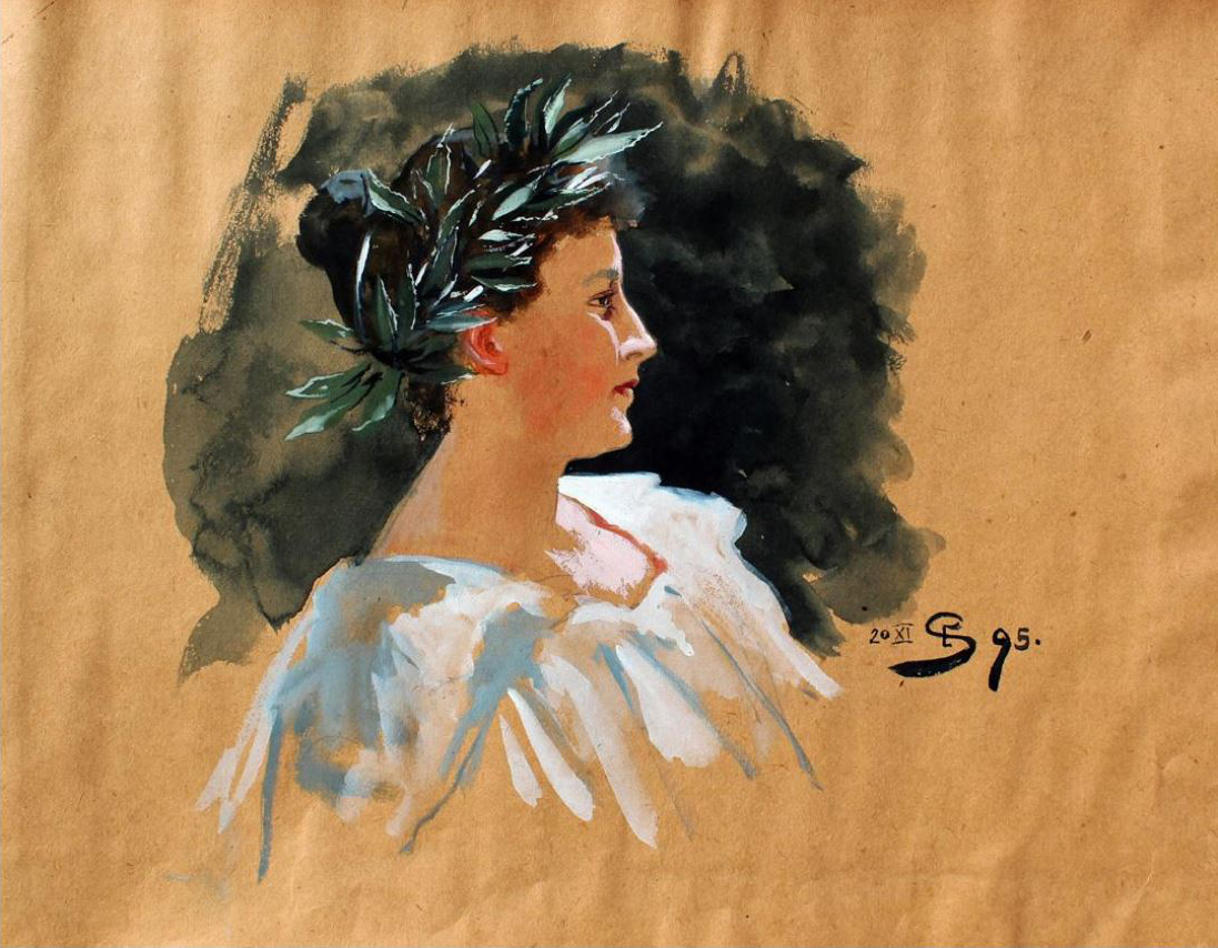 "Marie von Miller", Aquarell auf braunem Papier ca. 33 × 25 cm. In der Darstellung monogrammiert und datiert "20.11.1895"; auf der Rückseite ein handschriftlicher Text "Vivat Academicus!". Blatt aus dem Gästebuch der Münchner Mittwochsgesellschaft.